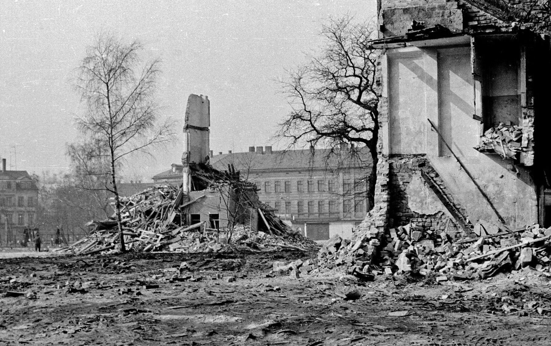 Großflächiger Abriss von Wohnhäusern in Leipzig-Neuschönefeld für einen Freizeitpark